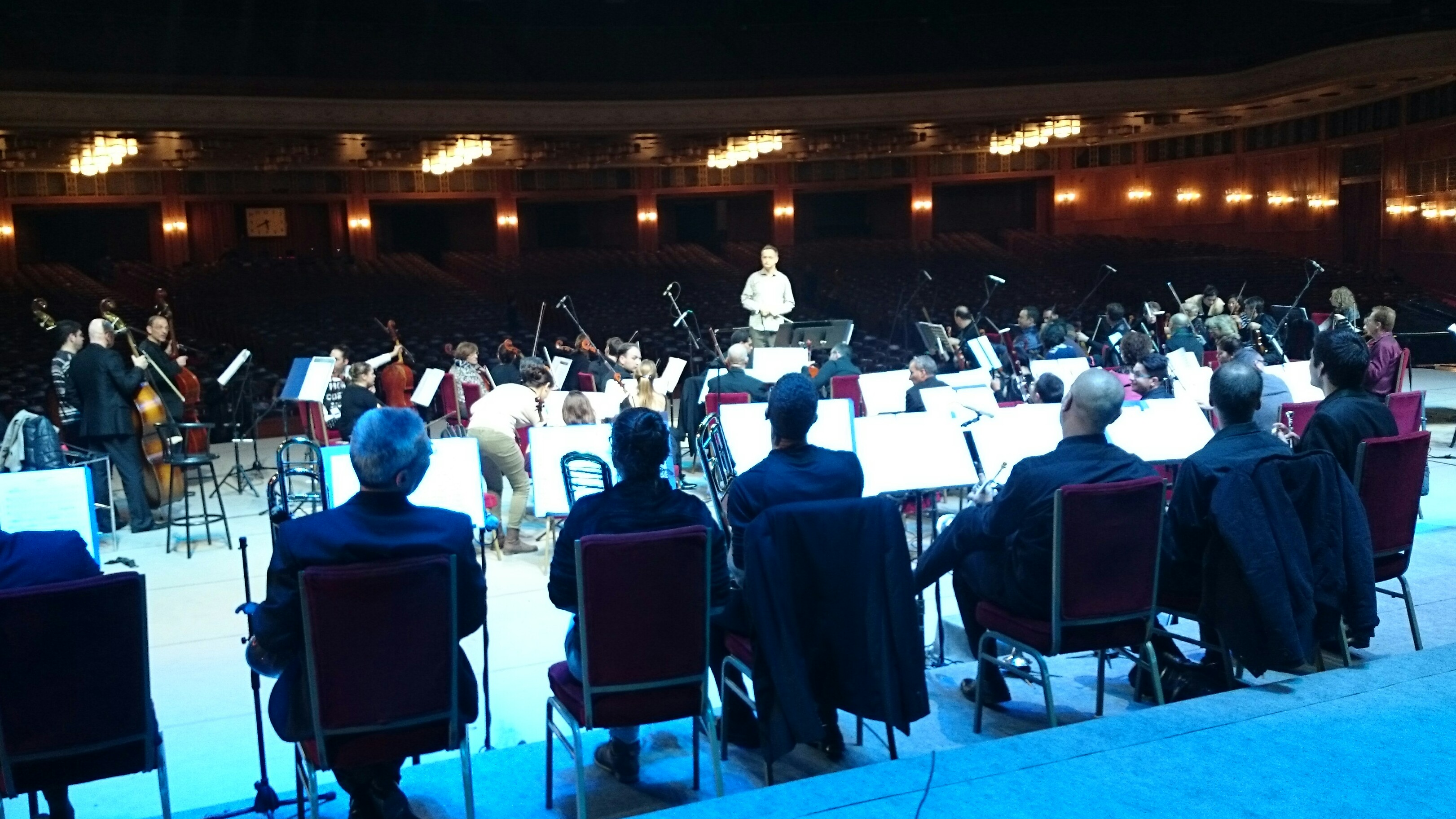 תזמורת נתניה - הקאמרית הקיבוצית במהלך מסע ההופעות בסין (2015) מנצח שלו עד-אל